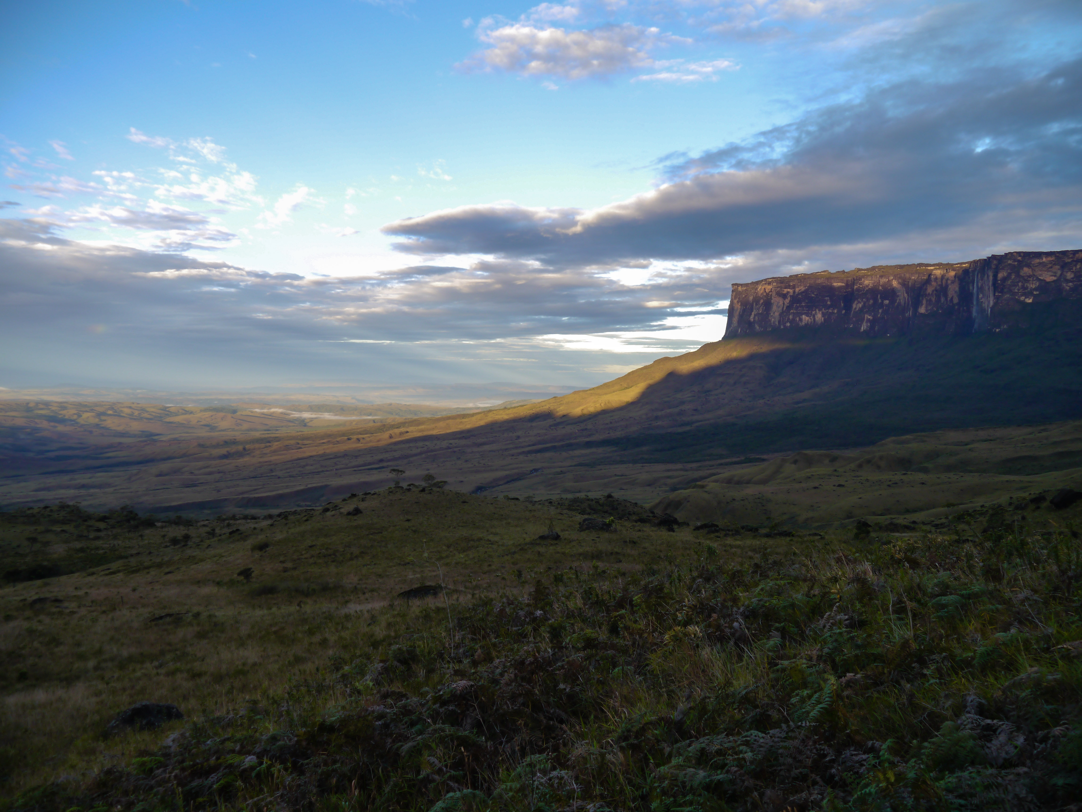 Mount Roraima, Venezuela